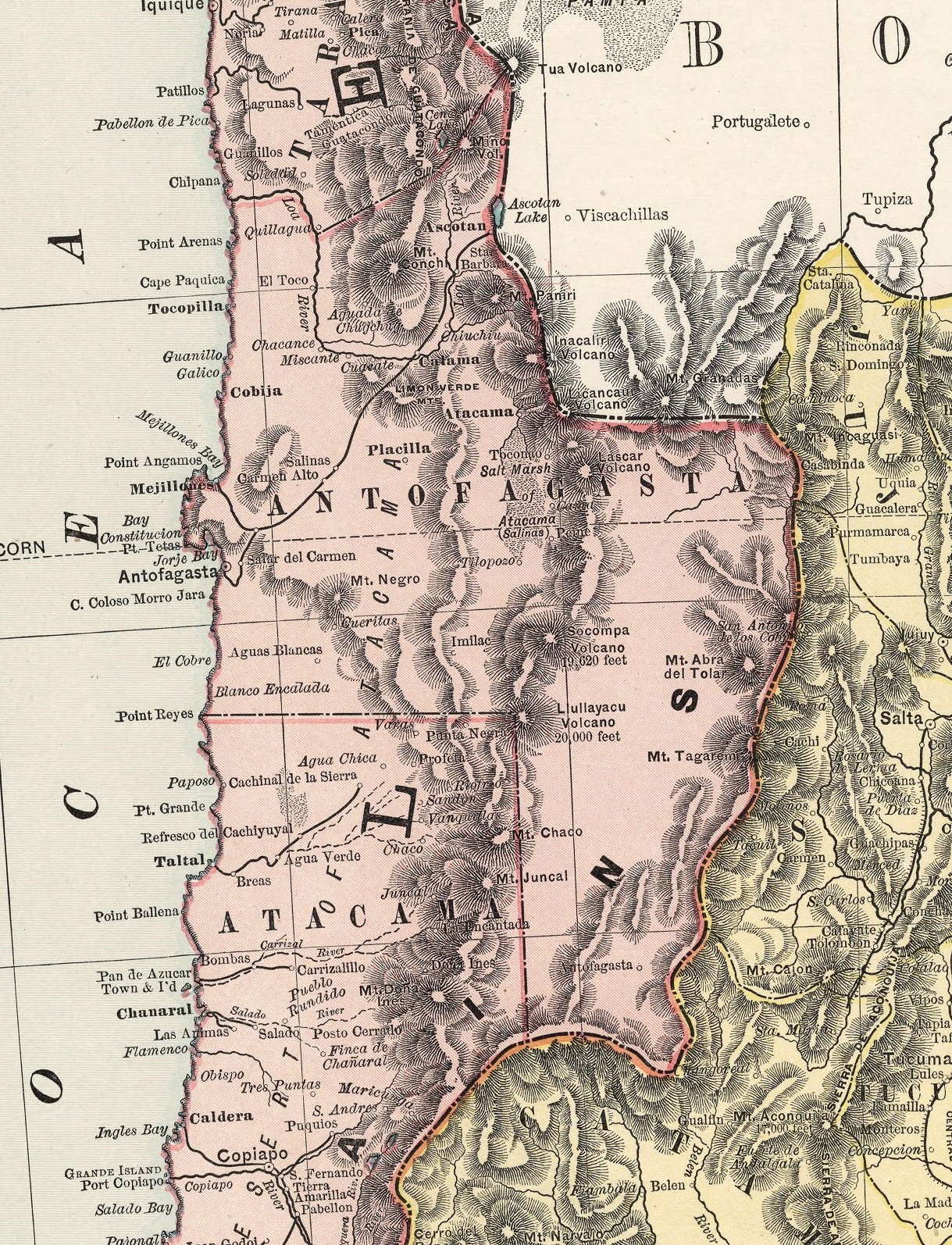 La Puna de Atacama mostrada en un mapa de 1892